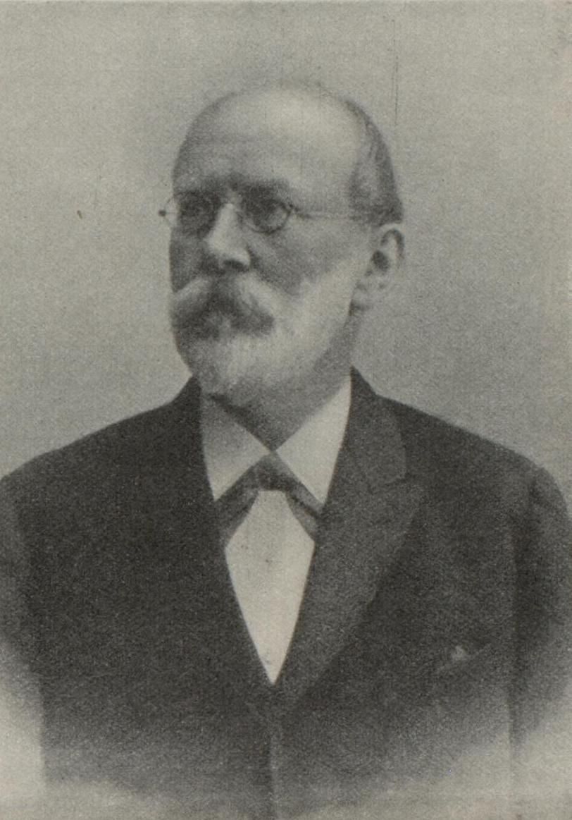 Porträtfoto von Gustav Voigtel